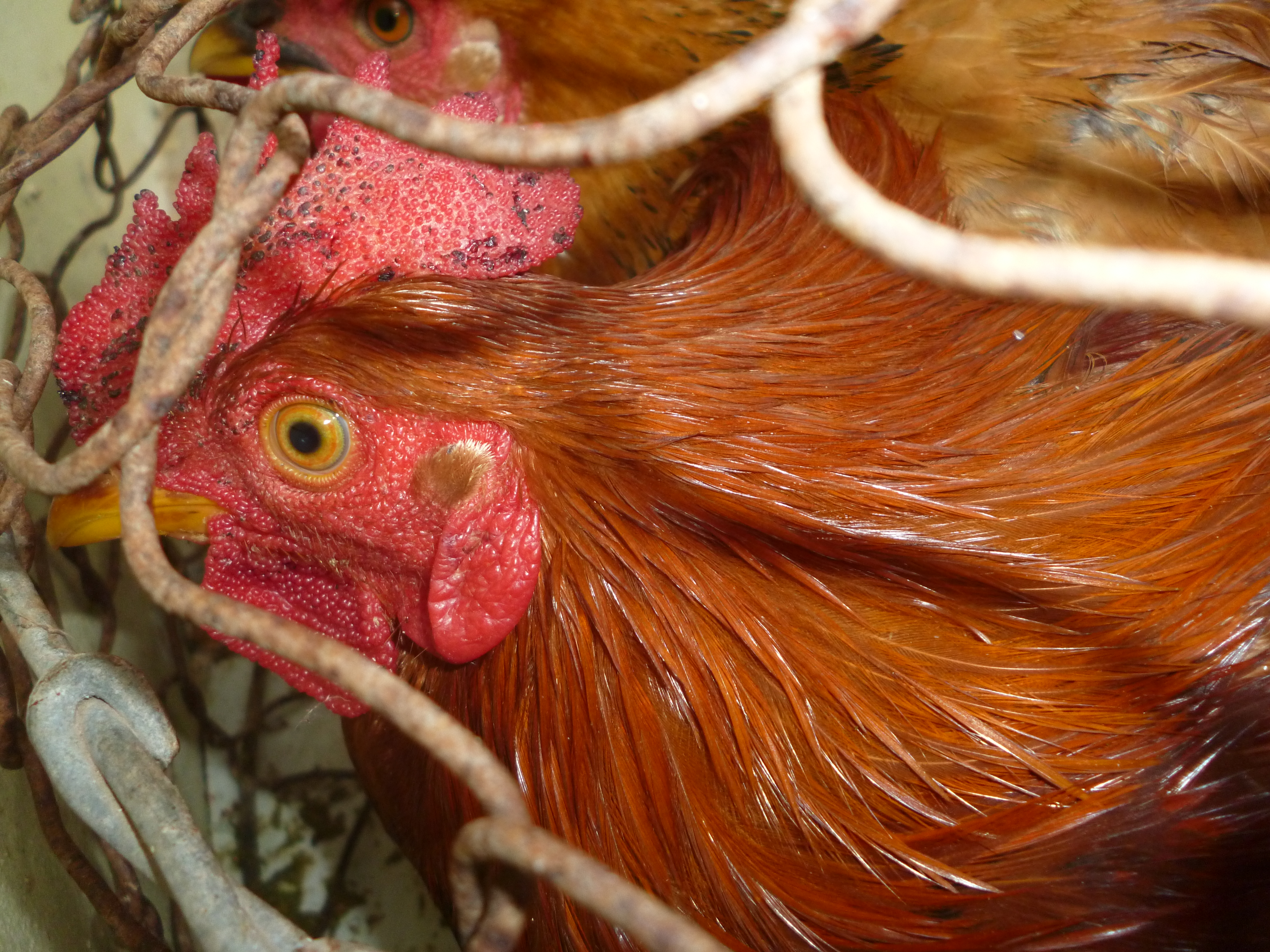 Hình chụp một con gà Tàu vàng bằng máy ảnh cá nhân rồi up lên